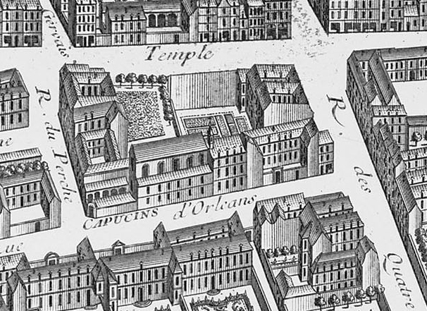 Plan de Turgot de 1739 (détail 3e arrondissement : l'ancien couvent des Capucins)